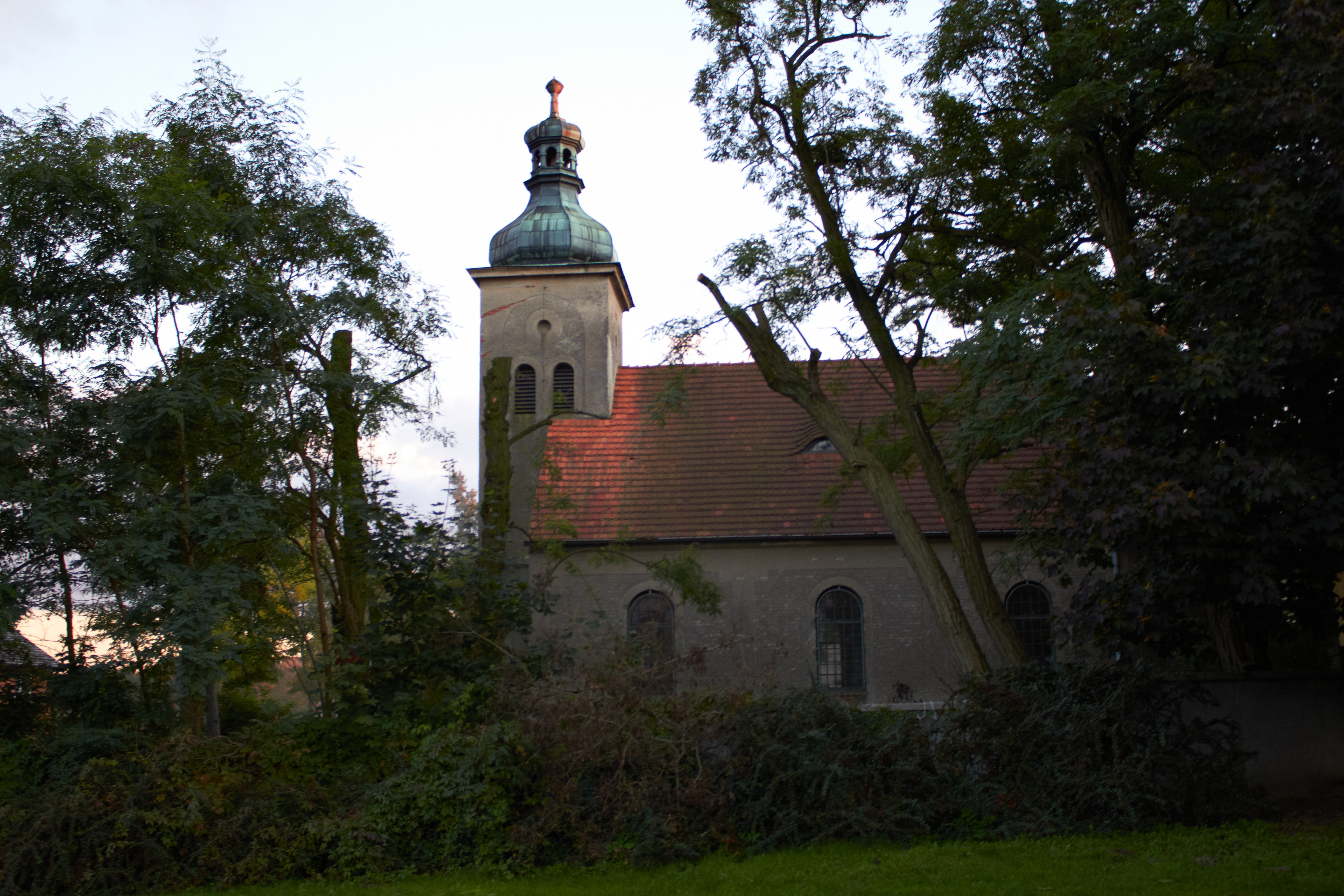 Żerków, zespół kościoła ewangelickiego, ob. nieużytkowany